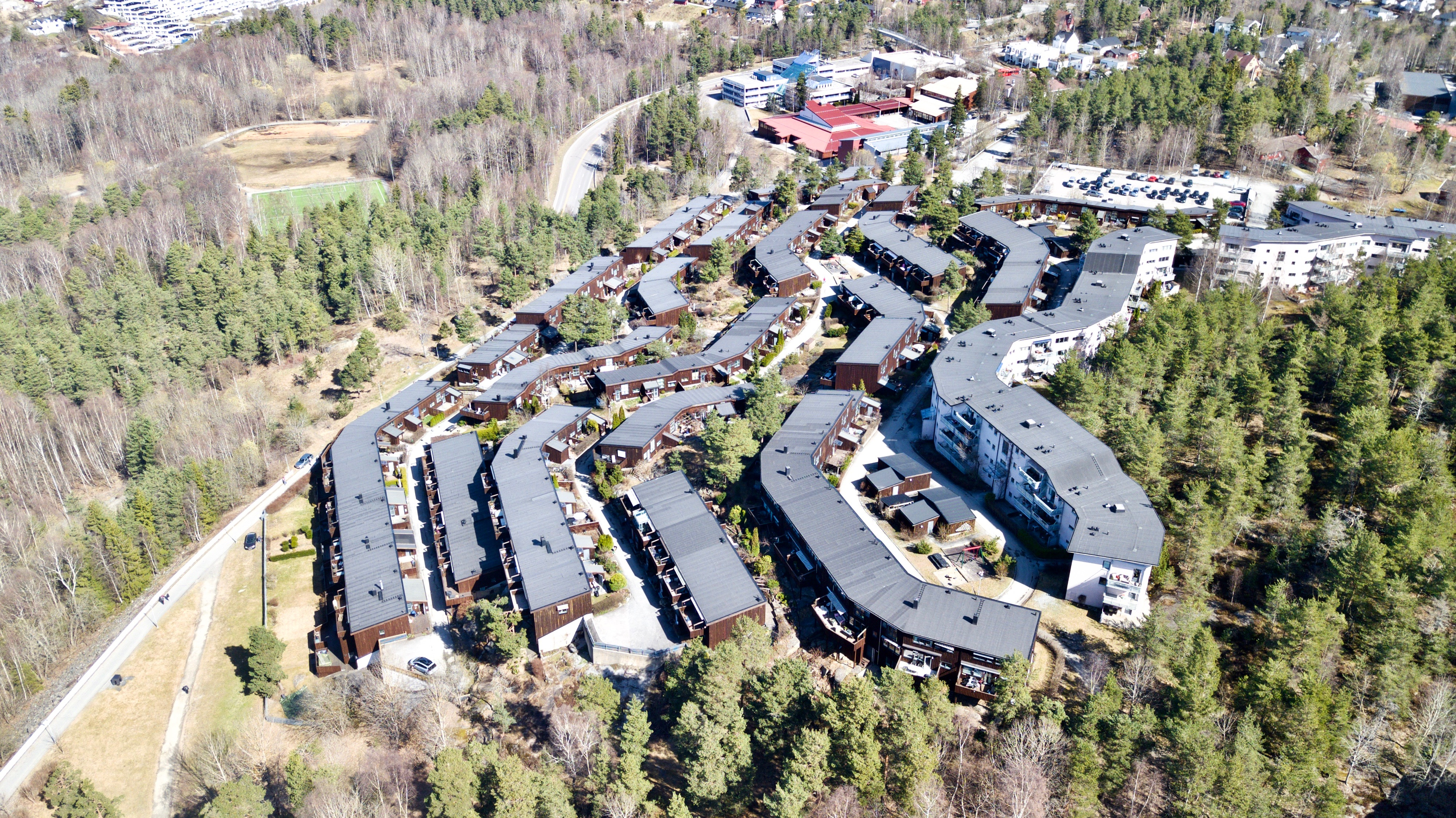 Hallagerbakken på Holmlia i Oslo.